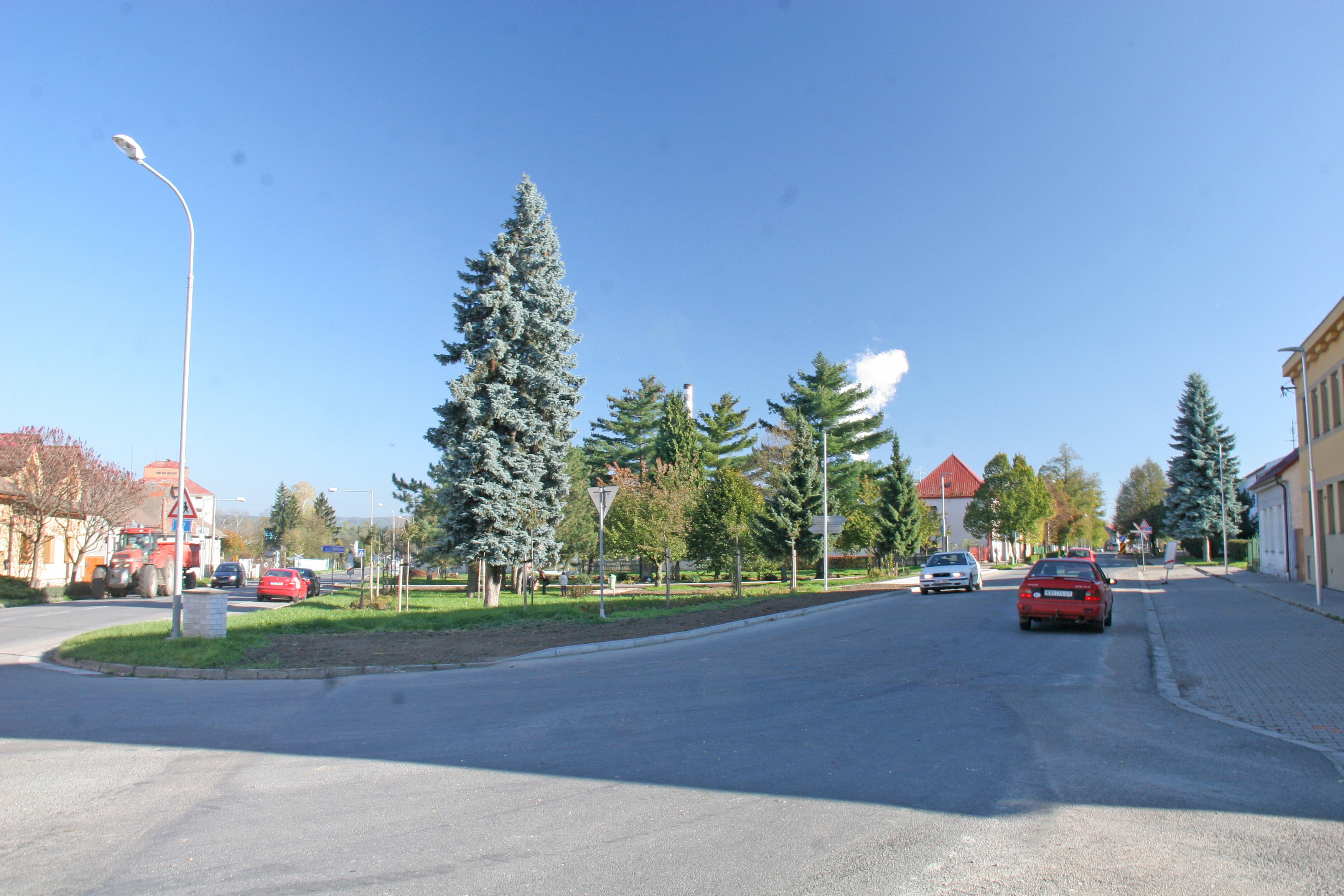 Vrdy náměstí